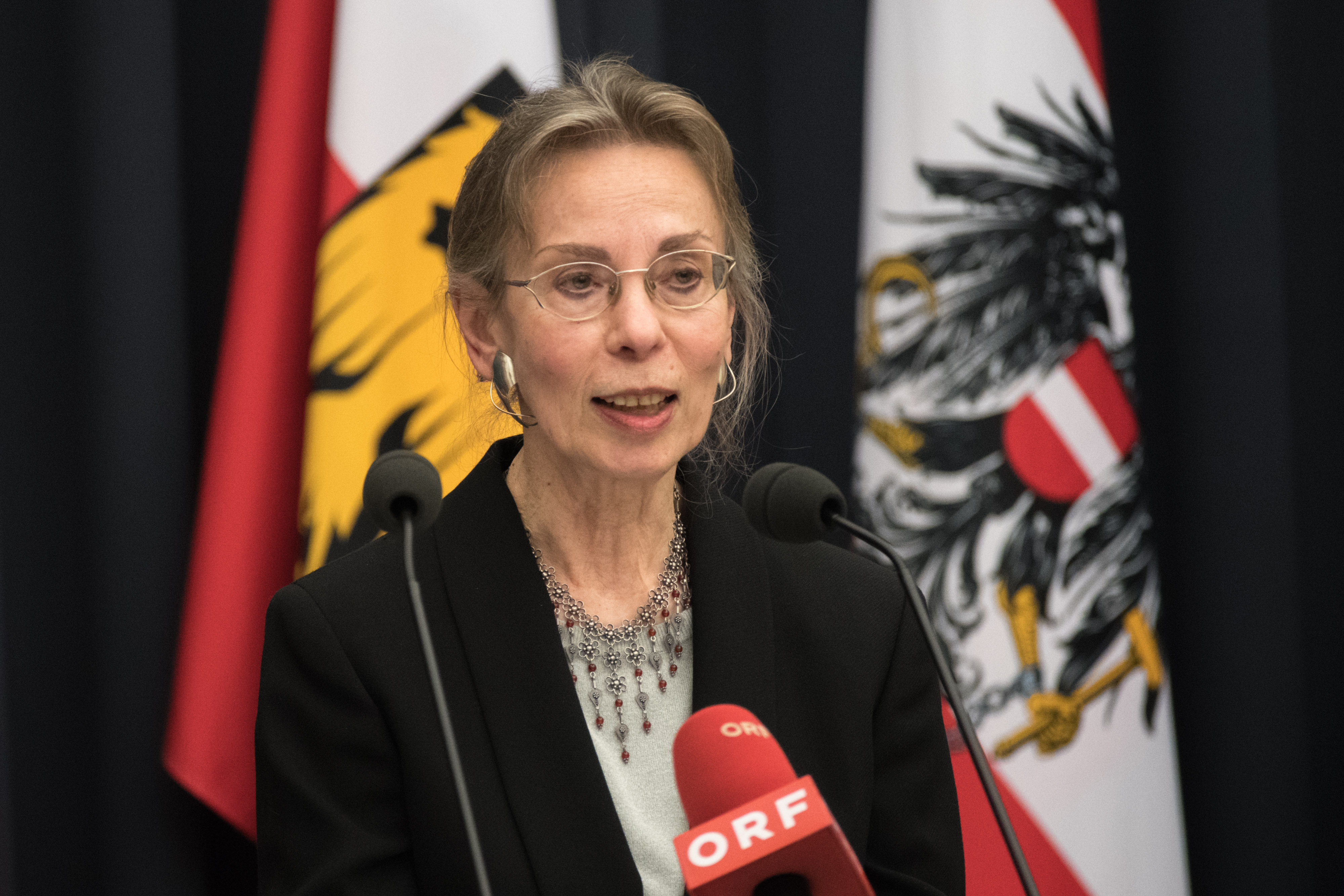 Anna Mitgutsch bei der Verleihung des Großen OÖ Landeskulturpreises 2019 in Linz